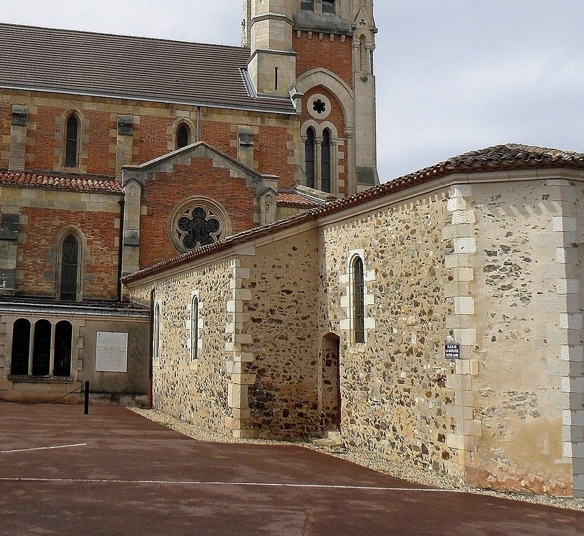 Archachon, la Chapelle des Marins a coté de la Basilique Notre-Dame